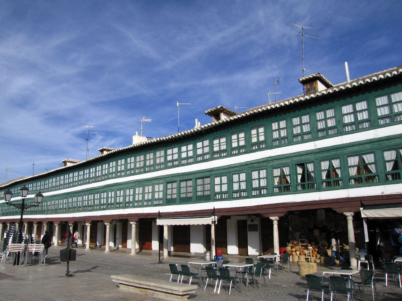 Almagro